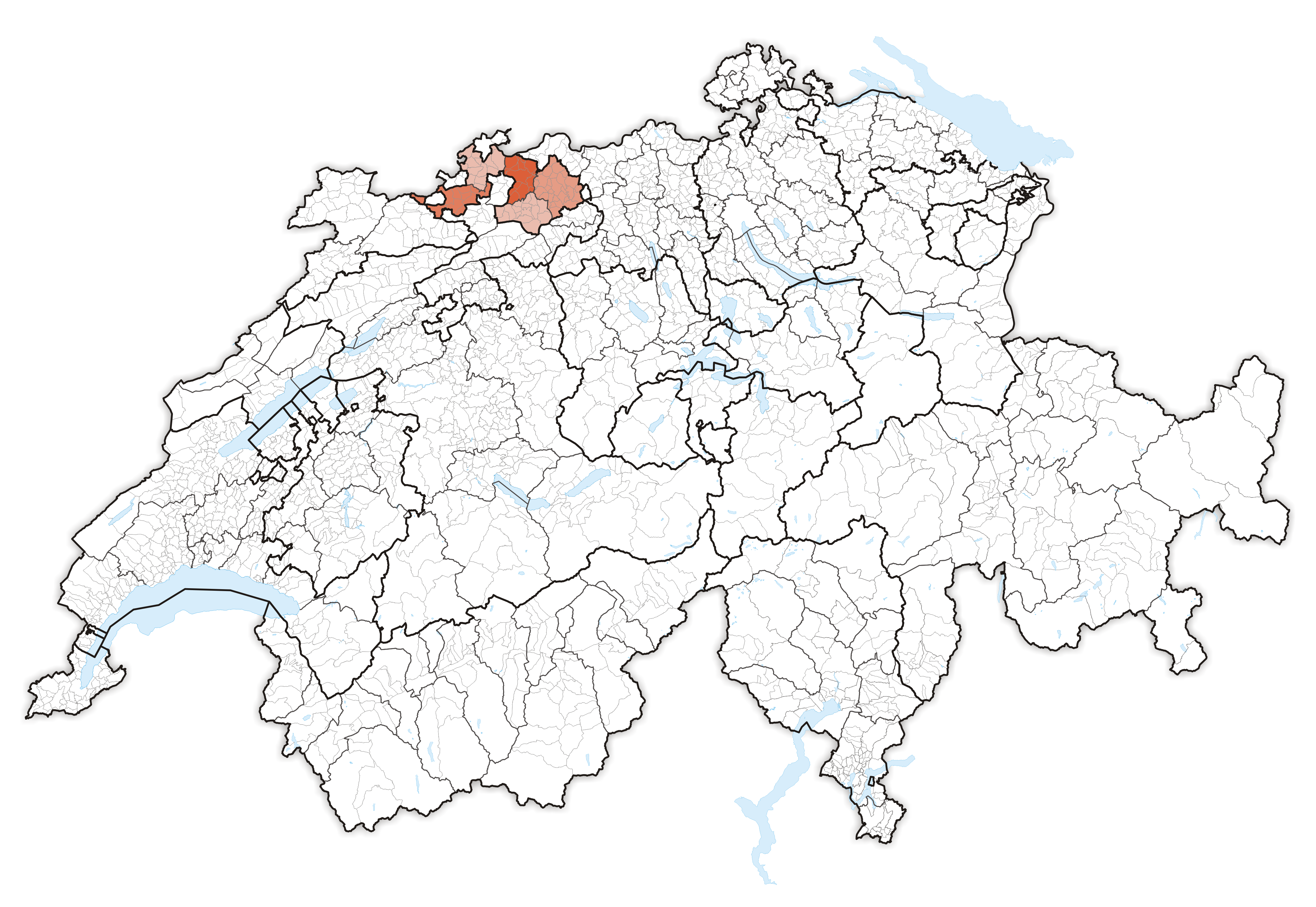 Canton Basel Landschaft